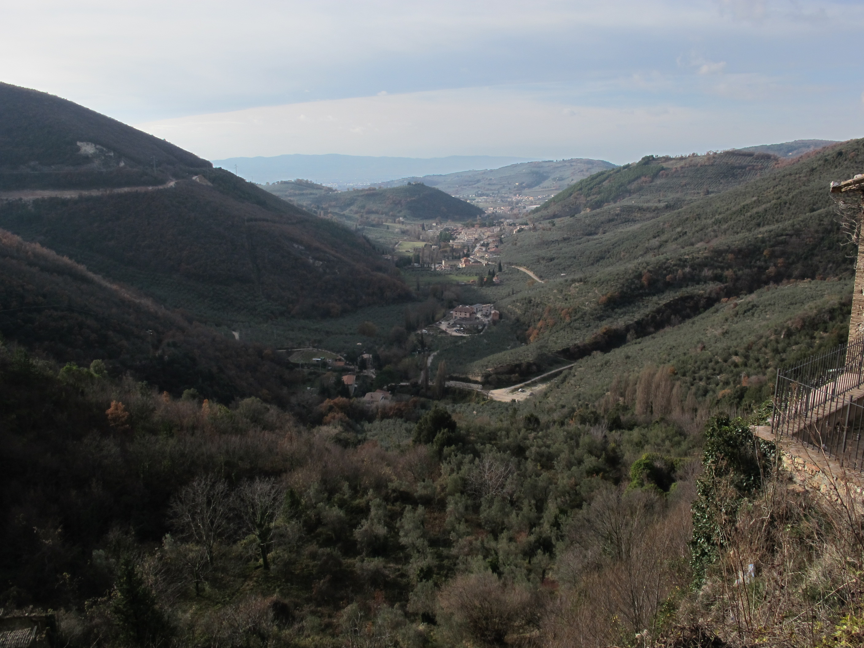 Pale, vista verso foligno